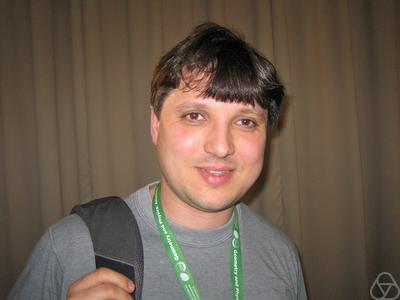 Foto di Paul Seidel